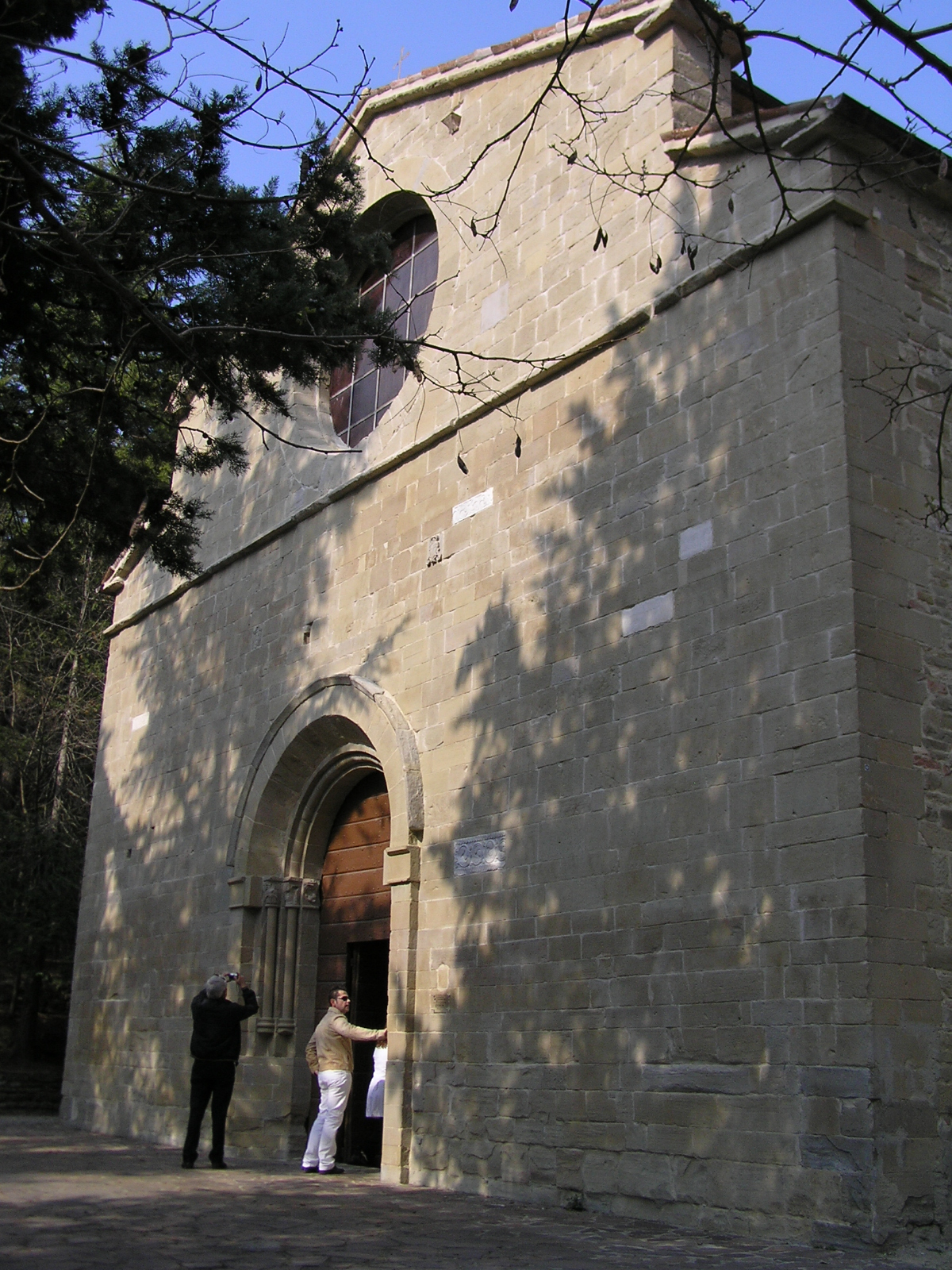 Facciata dell'abbazia di Sant'Ellero, a Galeata, fondata nel 497 d.C. e ricostruita nel X secolo.